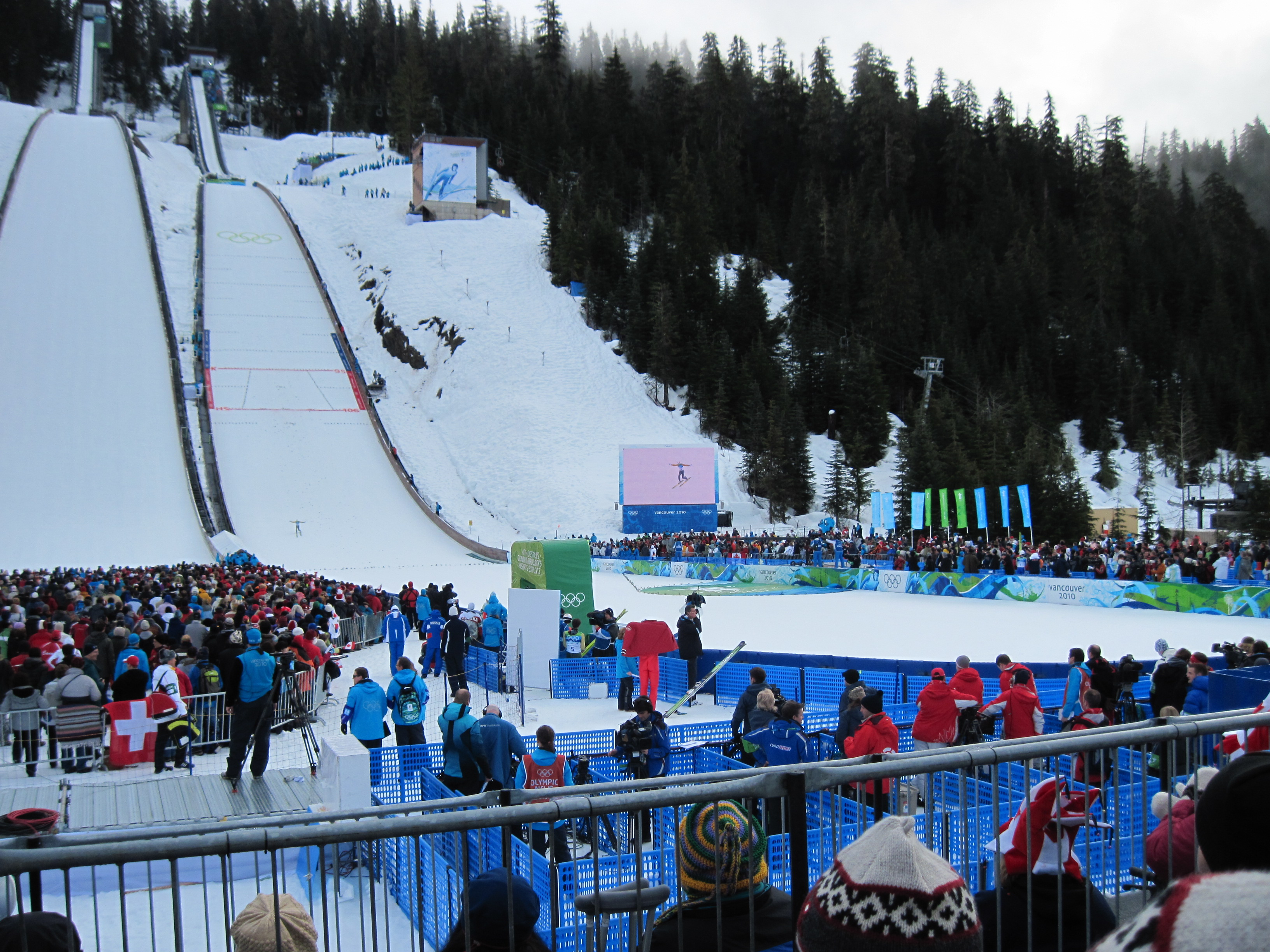 At 2010 Winter Games